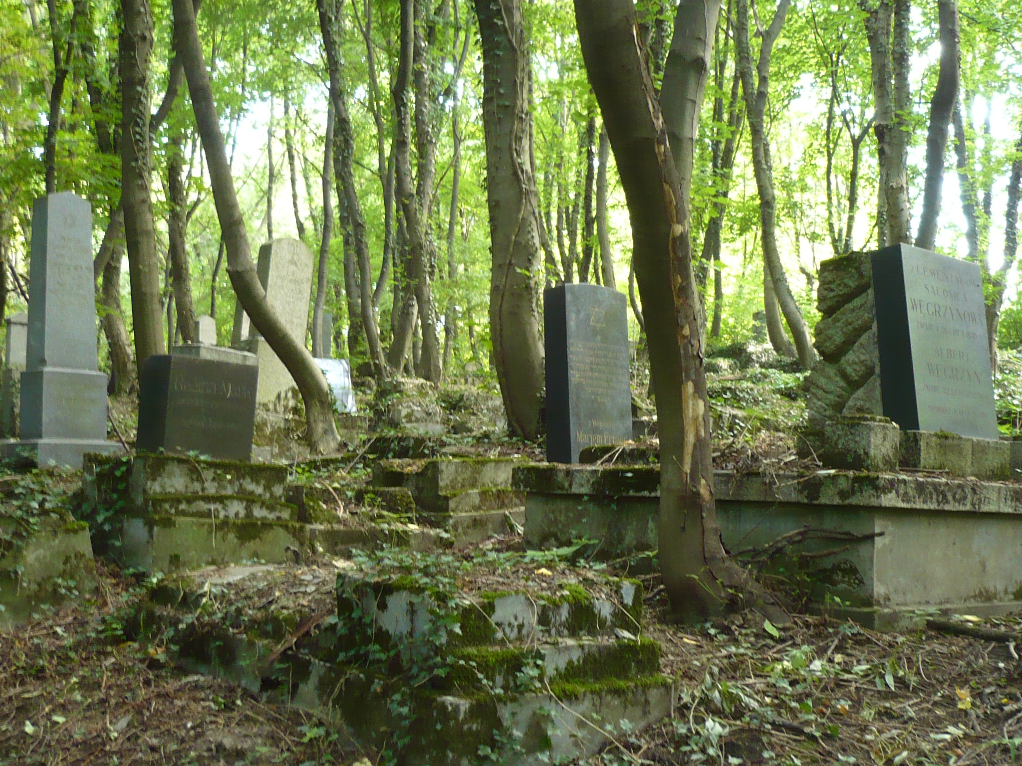 Przemyśl, nowy cmentarz żydowski